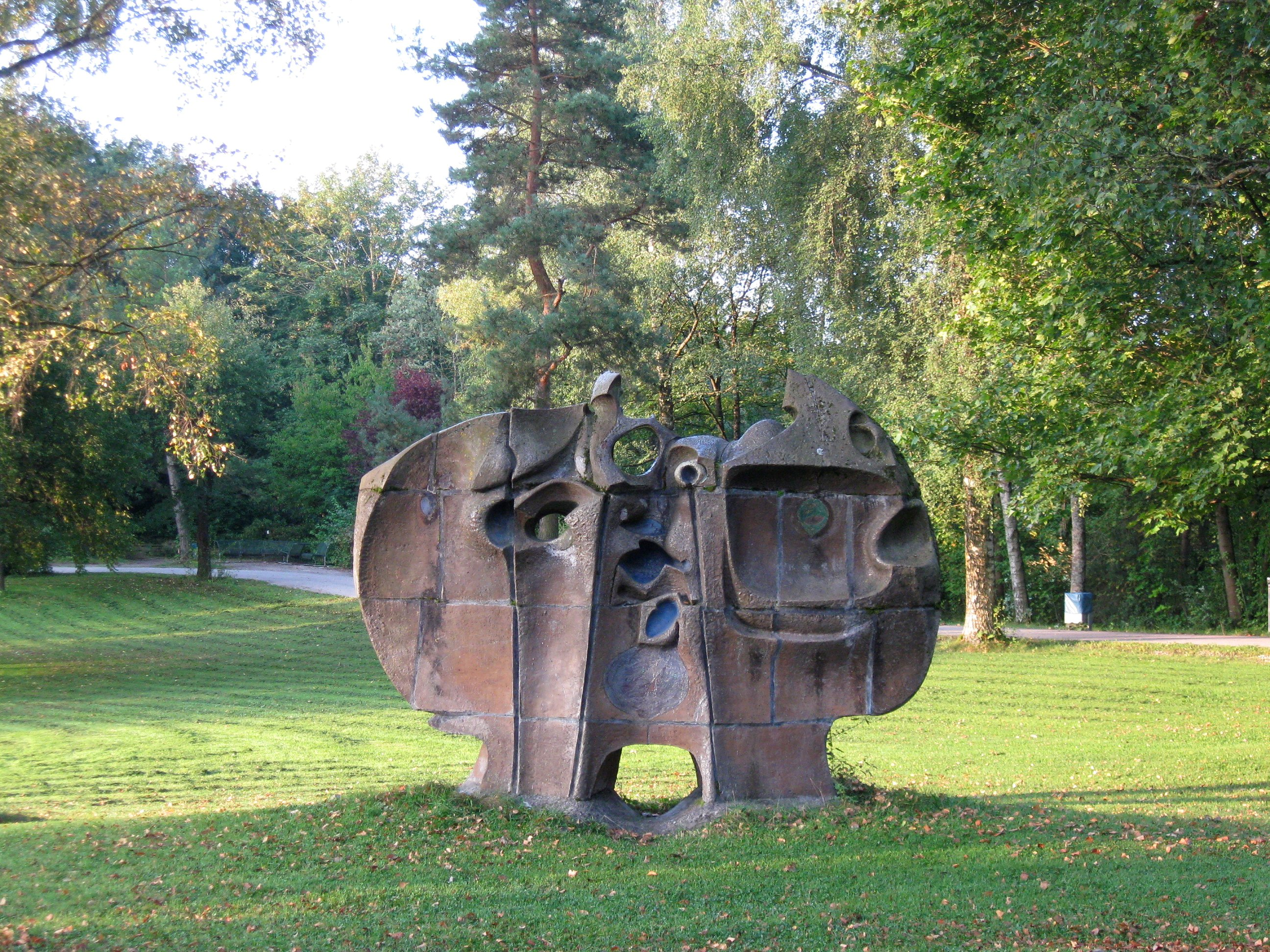 Reinhart Wolke: Blumen am Wege, um 1975, Patientengarten, Klinikum Großhadern, München